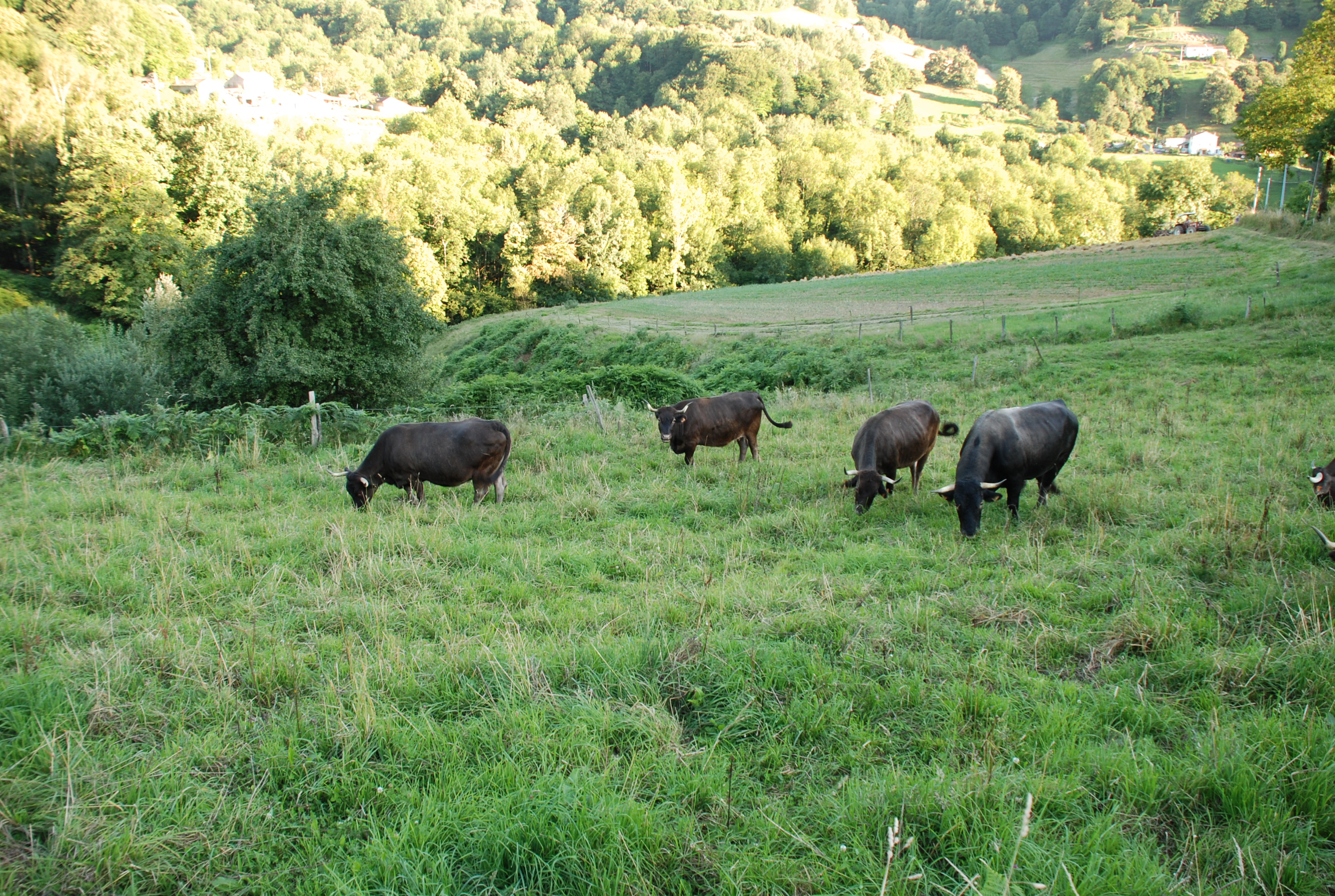 Vaches de la race Aure et saint Girons, aussi appeleée race Casta, photographiées dans le hameau du cap d'Erp, à Erp en Ariège